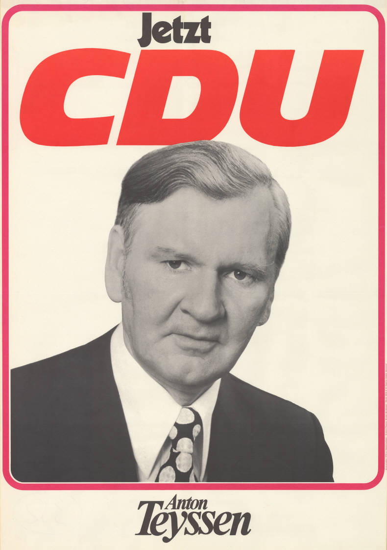 Jetzt CDU Anton Teyssen Abbildung: Porträtfoto Plakatart: Kandidaten-/Personenplakat mit Porträt Künstler_Grafiker: Graphic Design Broder Brodersen, Hannover Auftraggeber: CDU in Niedersachsen Drucker_Druckart_Druckort: Wiily F.P. Fehling GmbH, Hannover Objekt-Signatur: 10-008 : 352 Bestand: Landtagswahlplakate Niedersachsen (10-008) GliederungBestand10-18: Landtagswahlplakate Niedersachsen (10-008) » CDU Lizenz: KAS/ACDP 10-008 : 352 CC-BY-SA 3.0 DE